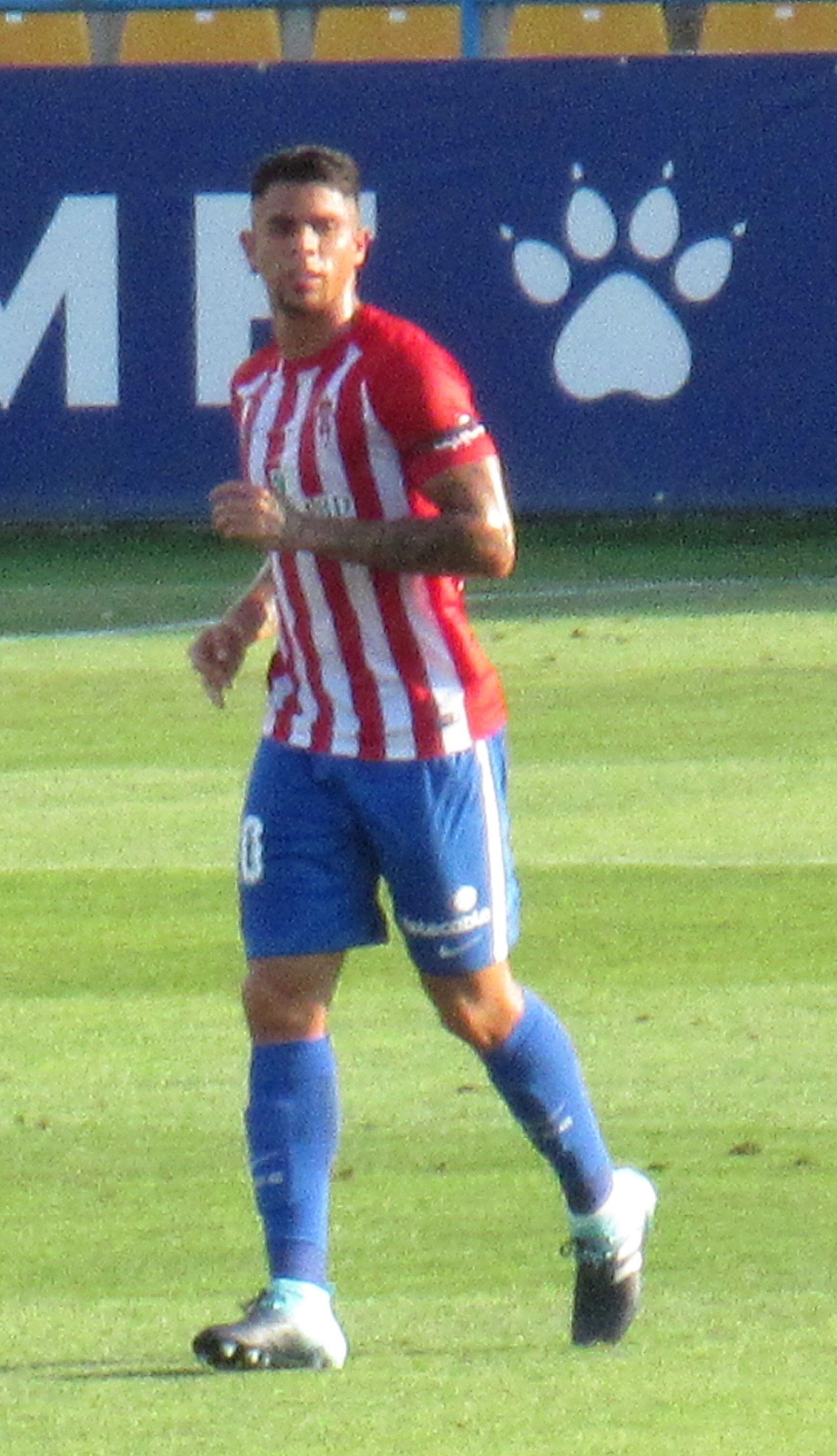 Juan Quintero durante el Alcorcón-Sporting de la temporada 2017-18.